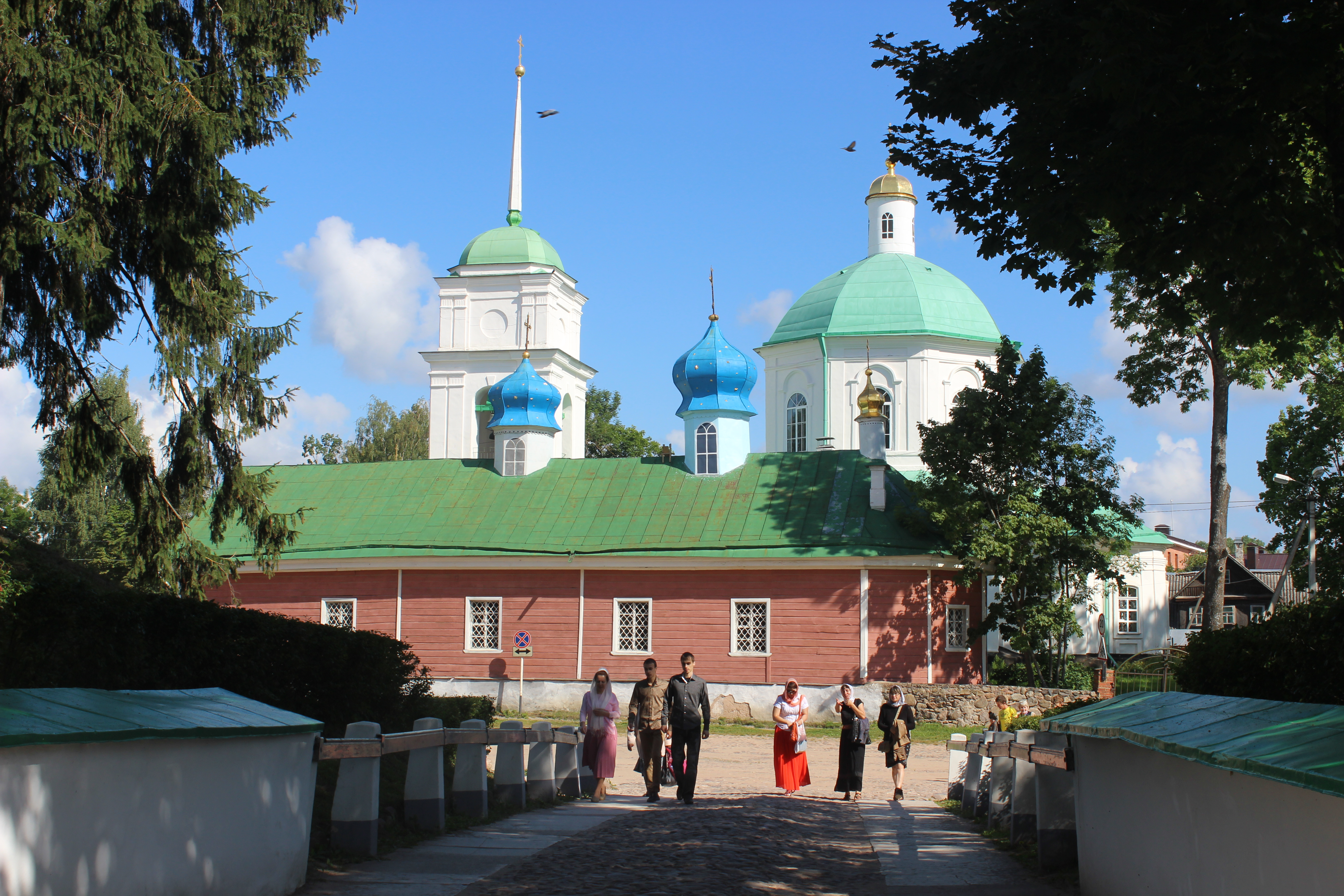 Ансамбль Псково-Печерского монастыря (Псковская область, Печоры, (на юго-восточной окраине города Печоры))